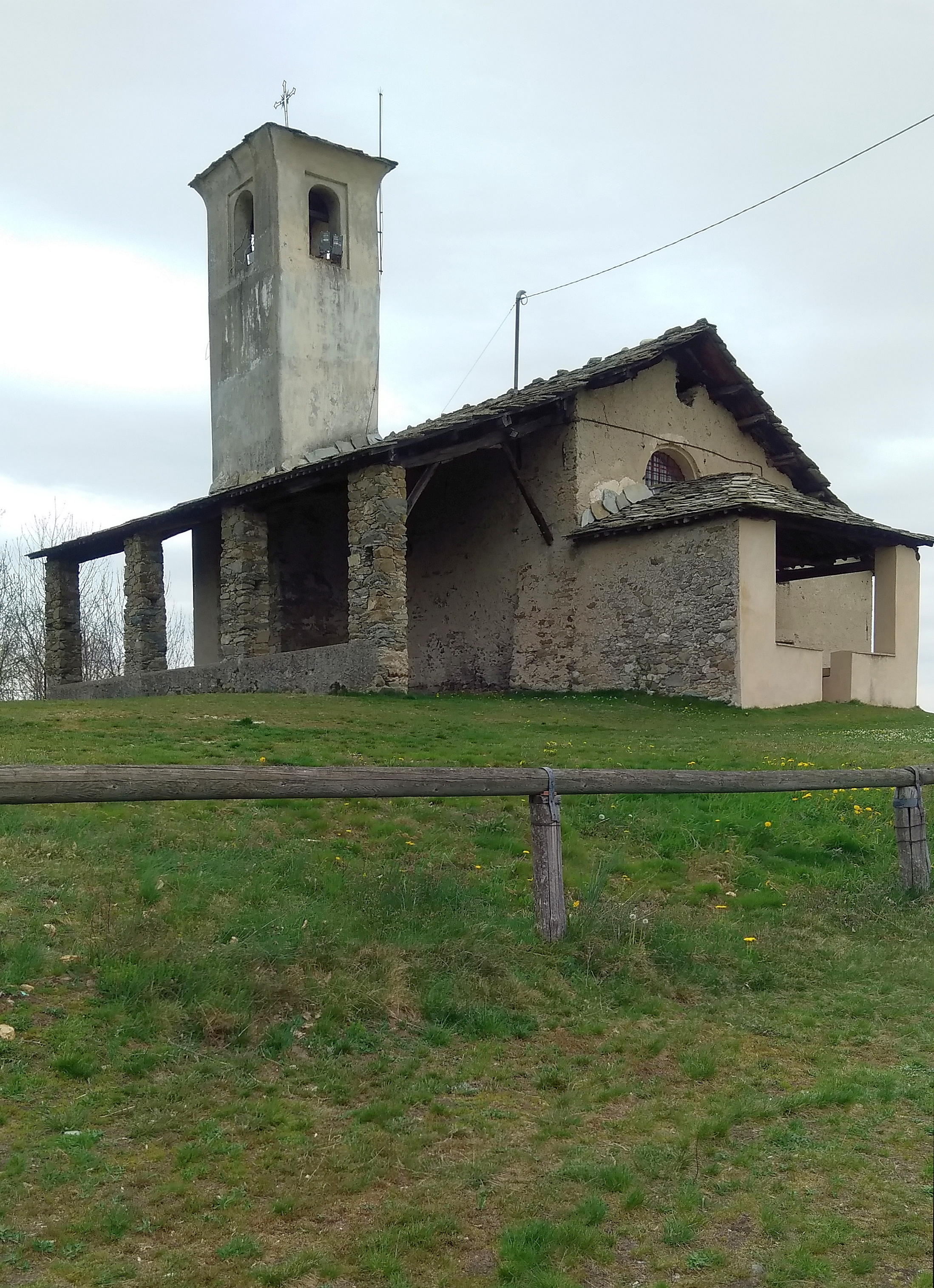 Santuario della Madonna di Peralba (Venasca) - vista d'insieme